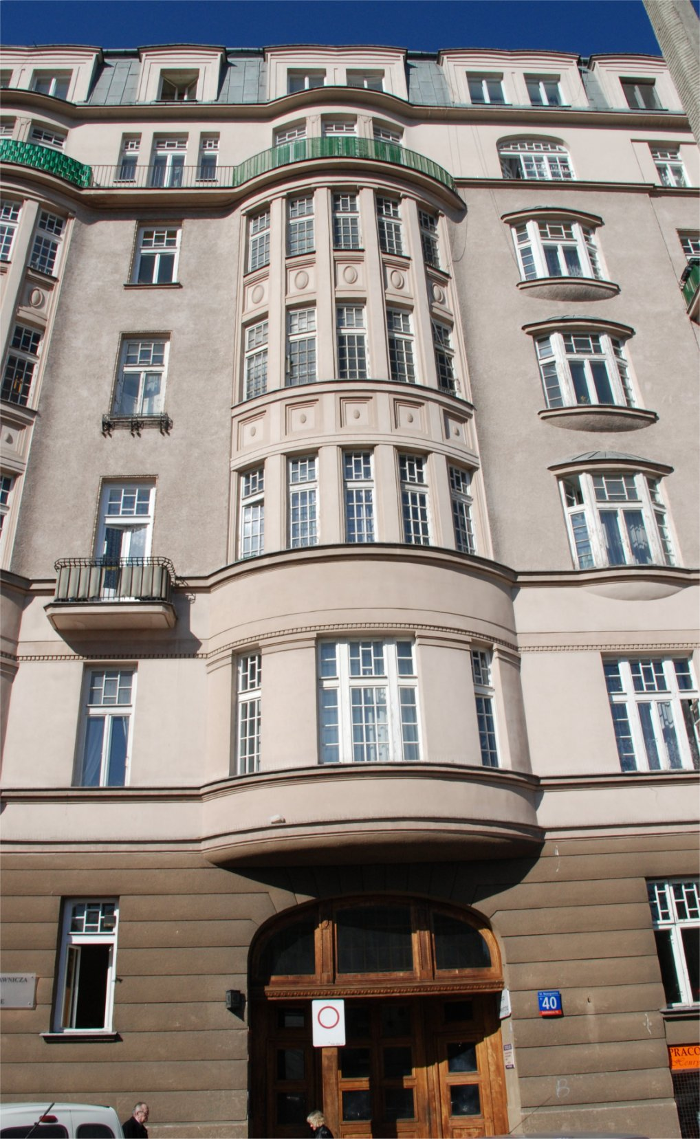 pl wiki